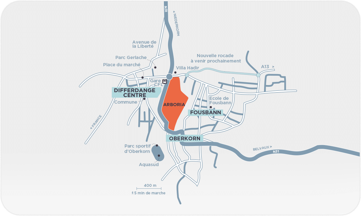 g